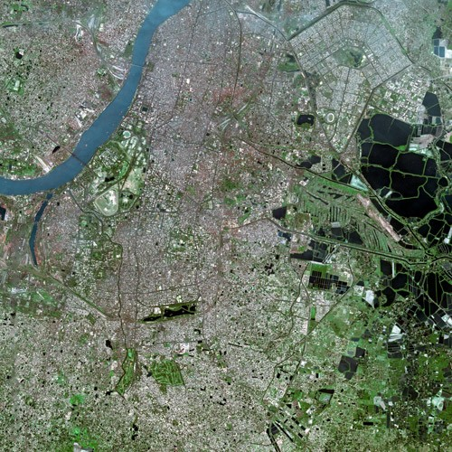 Kolkata by SPOT Satellite